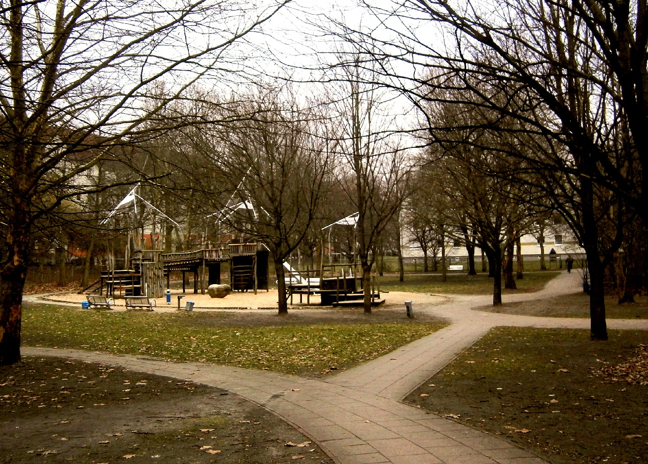 Der Hönower Weg ist einer der 20 grünen Hauptwege Berlins. Er führt vom Volkspark Friedrichshain zunächst durch den Bezirk Prenzlauer Berg. Er verläuft insbesondere zwischen Storkower Straße und Hanns-Eisler-Straße über den Pieskower Weg und durch den Einsteinpark. Im Bild der Spielplatz im Park.